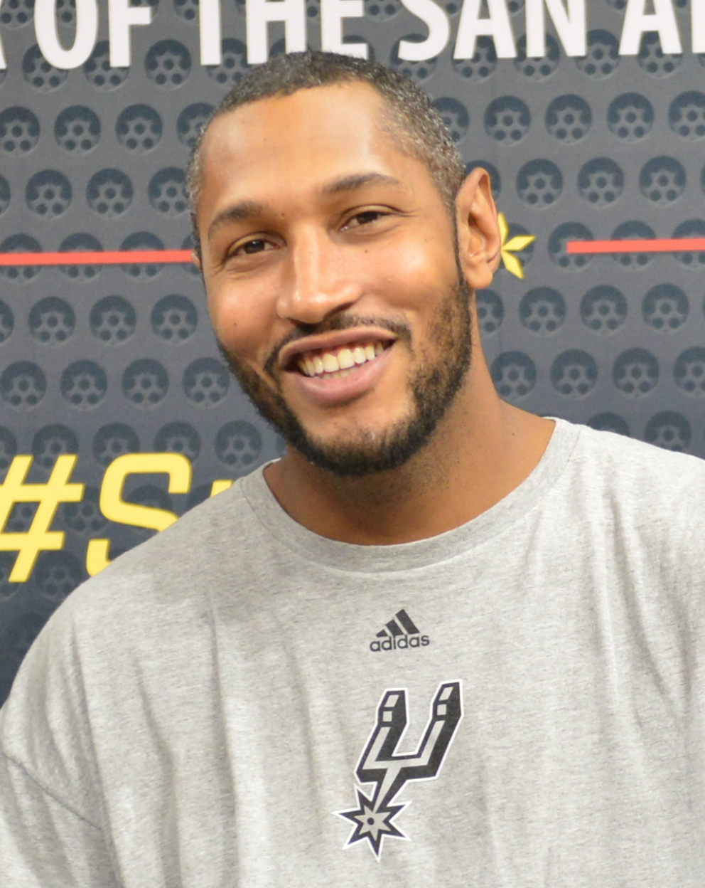 Boris Diaw